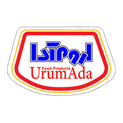 اروم آدا